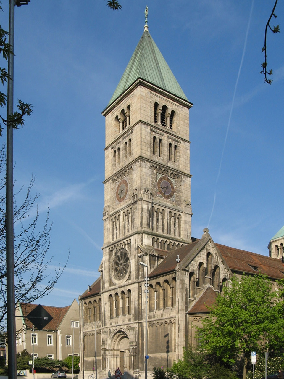 Heilig Geist Kirche Schweinfurt